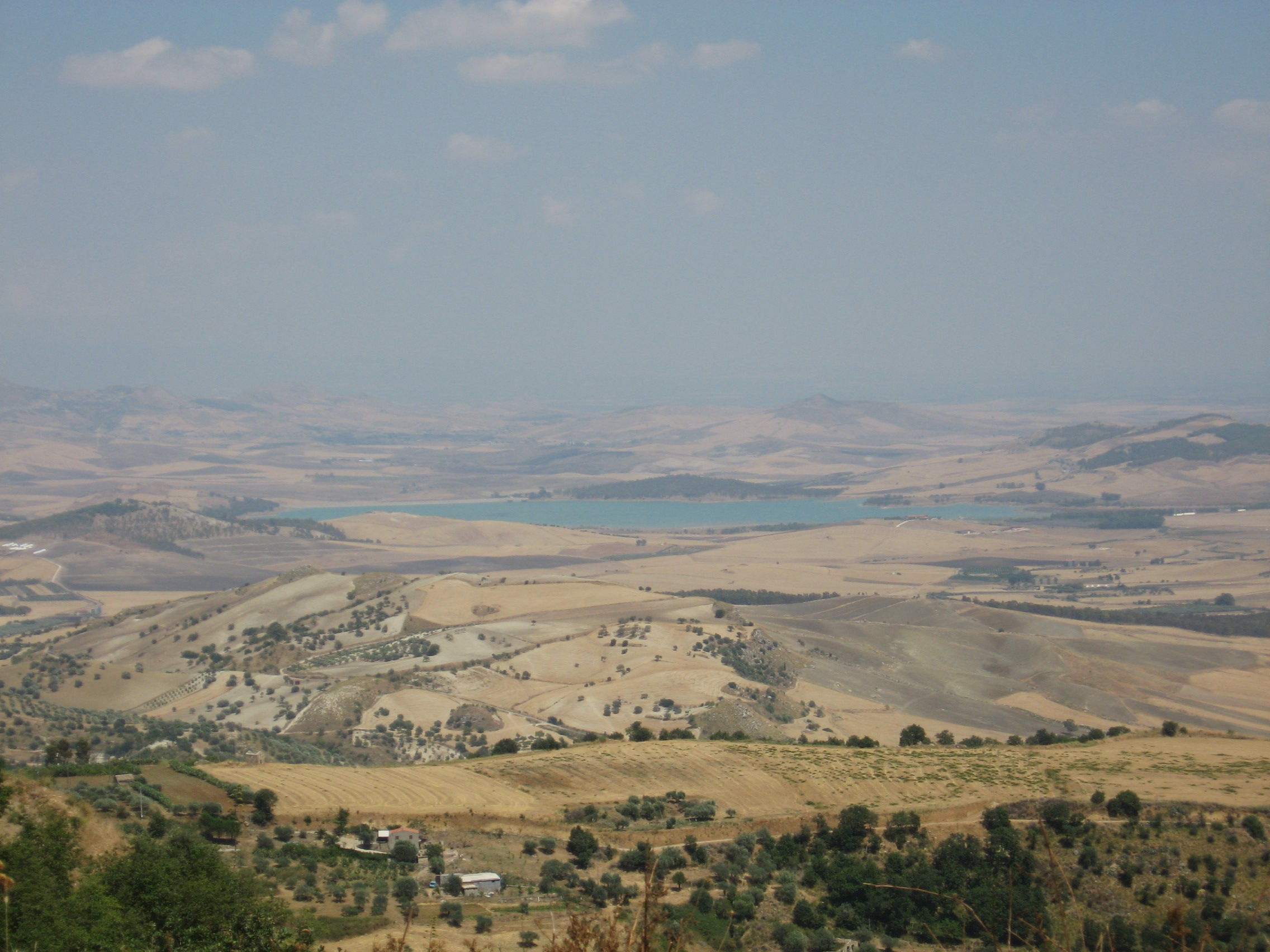 Vista del lago di Ogliastro da Aidone.